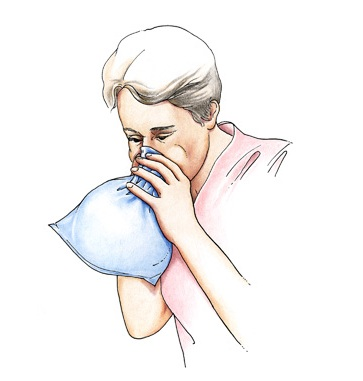 علاج القُلاء التنفسي